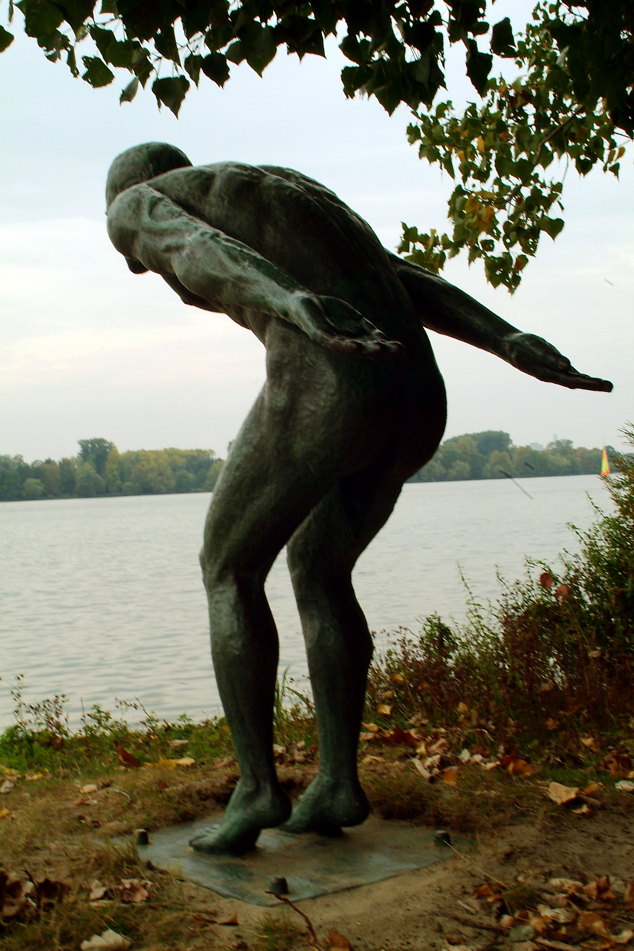 Die Skulptur "Der Schwimmer" von Erich Haberland von 1950 wurde in Hannover am Südende des Maschsees aufgestellt, auf dem Gelände des "Strandbades Maschsee.